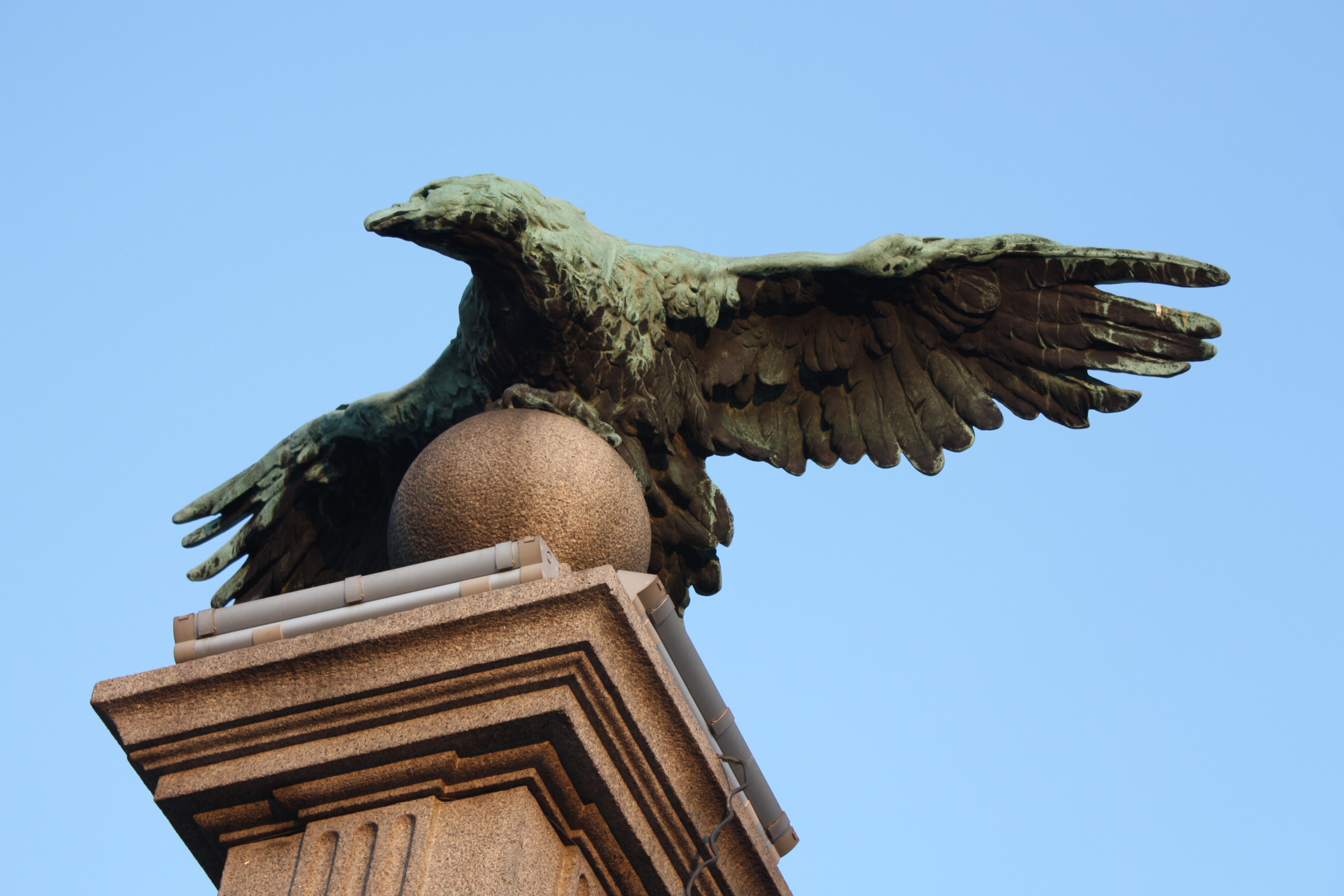 Adlerbrücke, Orlov most, Орлов мост, Sofia, Bulgaria